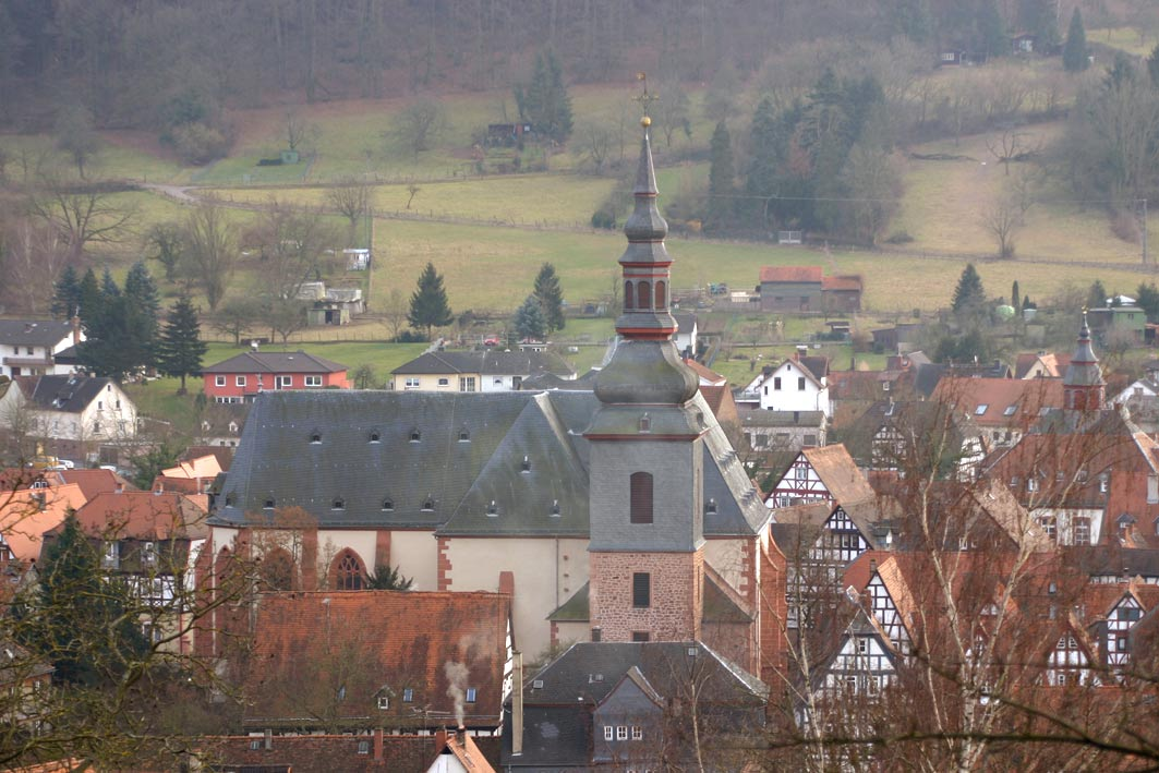 Die Marienkirche in Büdingen, Nordfront